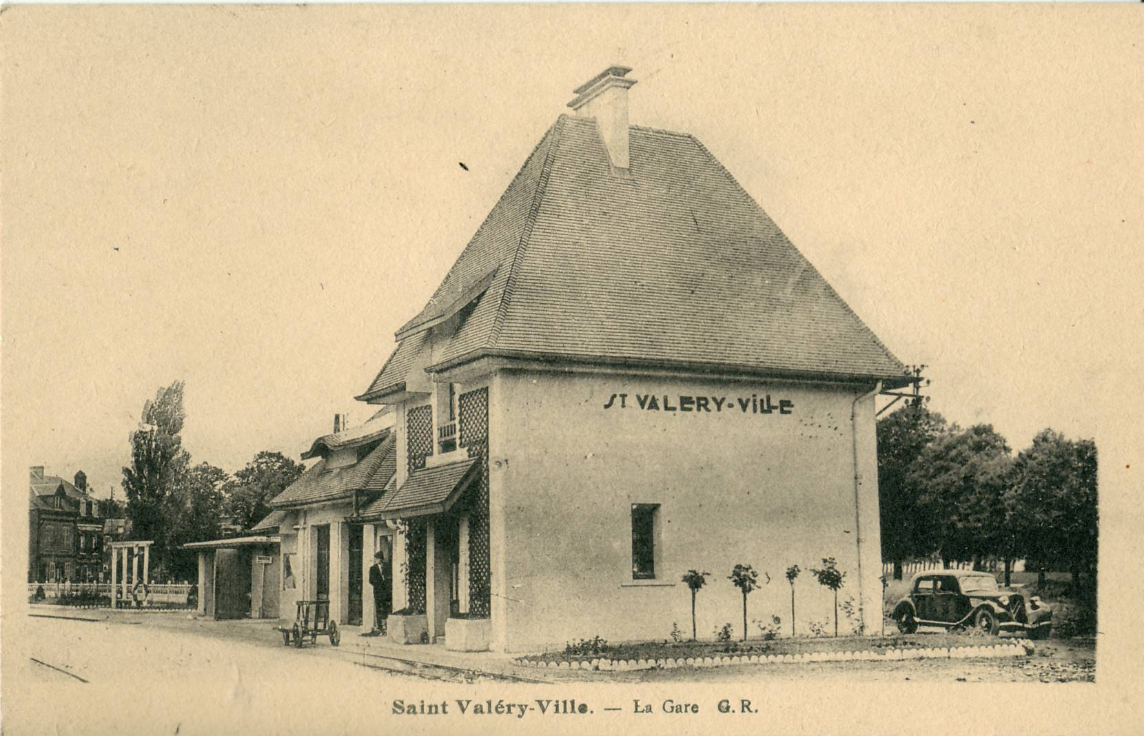 Carte postale ancienne éditée par GR La gare de Saint-Valery-Ville des Chemins de fer économiques de la Somme (réseau des Bains de Mer), actuellement exploitée par le Chemin de fer de la baie de Somme